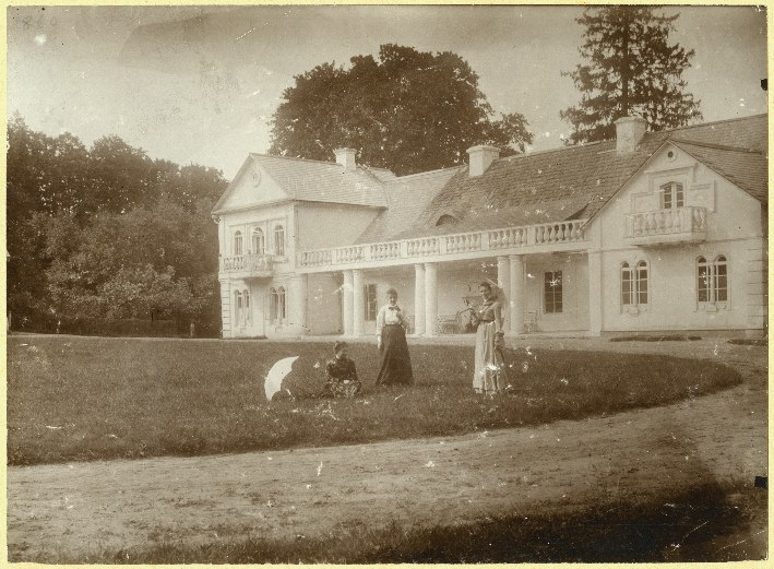 Гарнастаевічы. Сядзібны домБеларуская (тарашкевіца): Гарнастаевічы (Harnastajevičy). Сядзіба